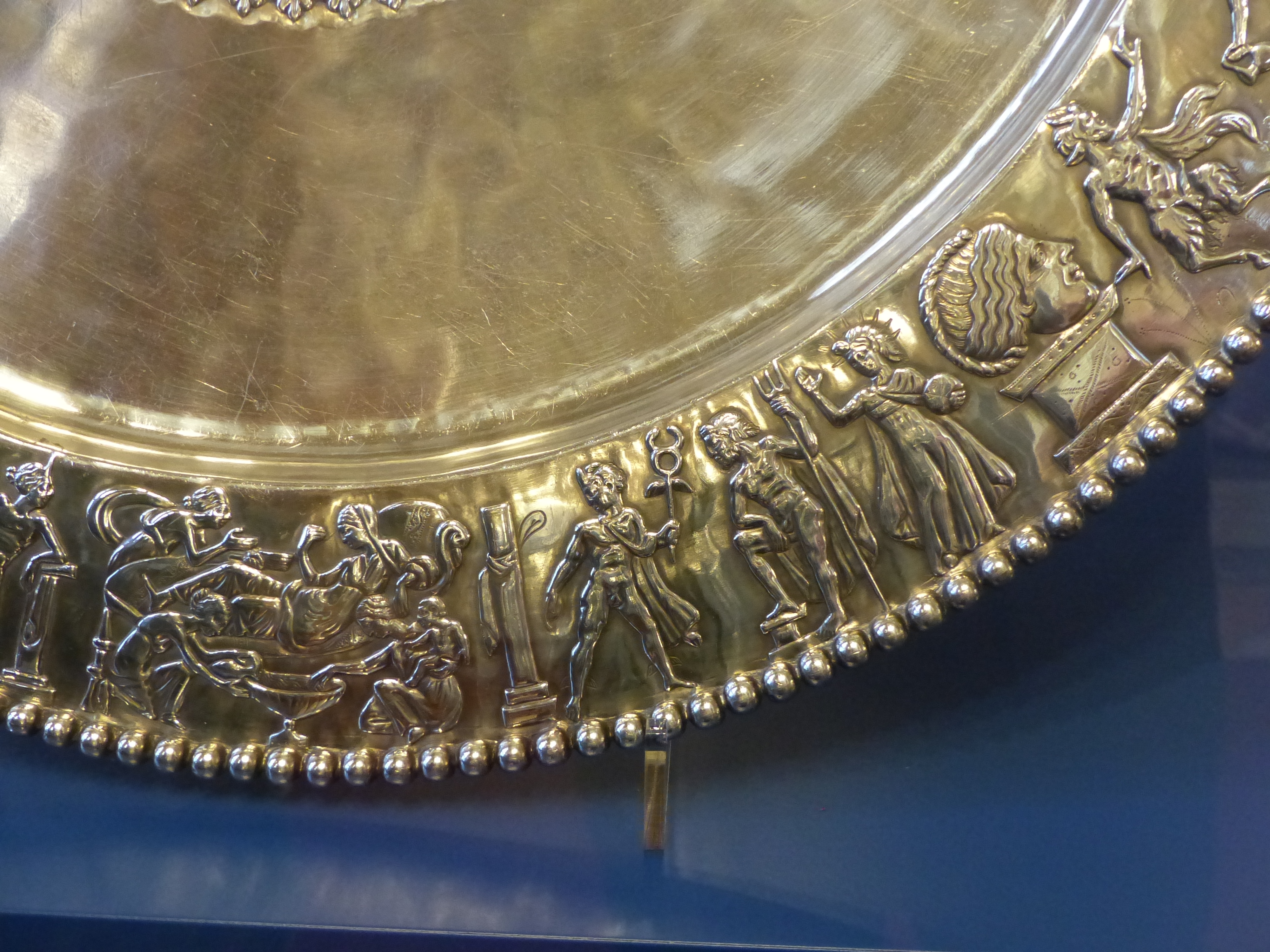 Akhilleusz tál. A Seuso kincs legnagyobb méretű darabja. 72 cm átmérőjű és 11,8 kb tömegű. Akhilleusz életéből vett jelenetek díszítik. Tálalásra és valószínűleg dísztálként is használták. Egyetlen vastag, öntött ezüstlapból készítették. A peremét gyöngysorral keretelték. A medalion felett Pallasz Athéné és Poszeidon Athén feletti versengése, két oldalán dionüszoszi menet.